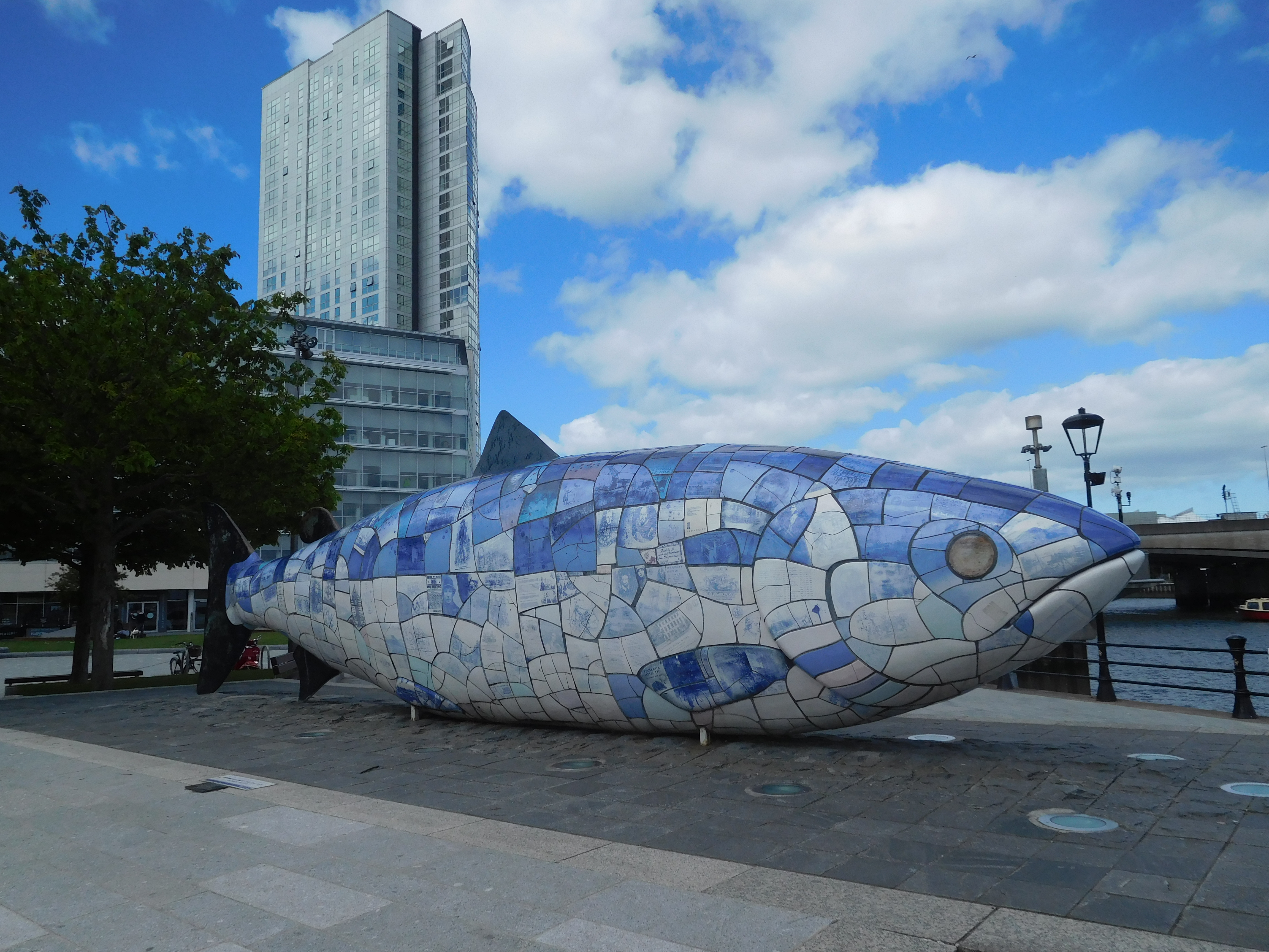 Большая рыба на фоне городского антуража в Белфасте, 2018 год